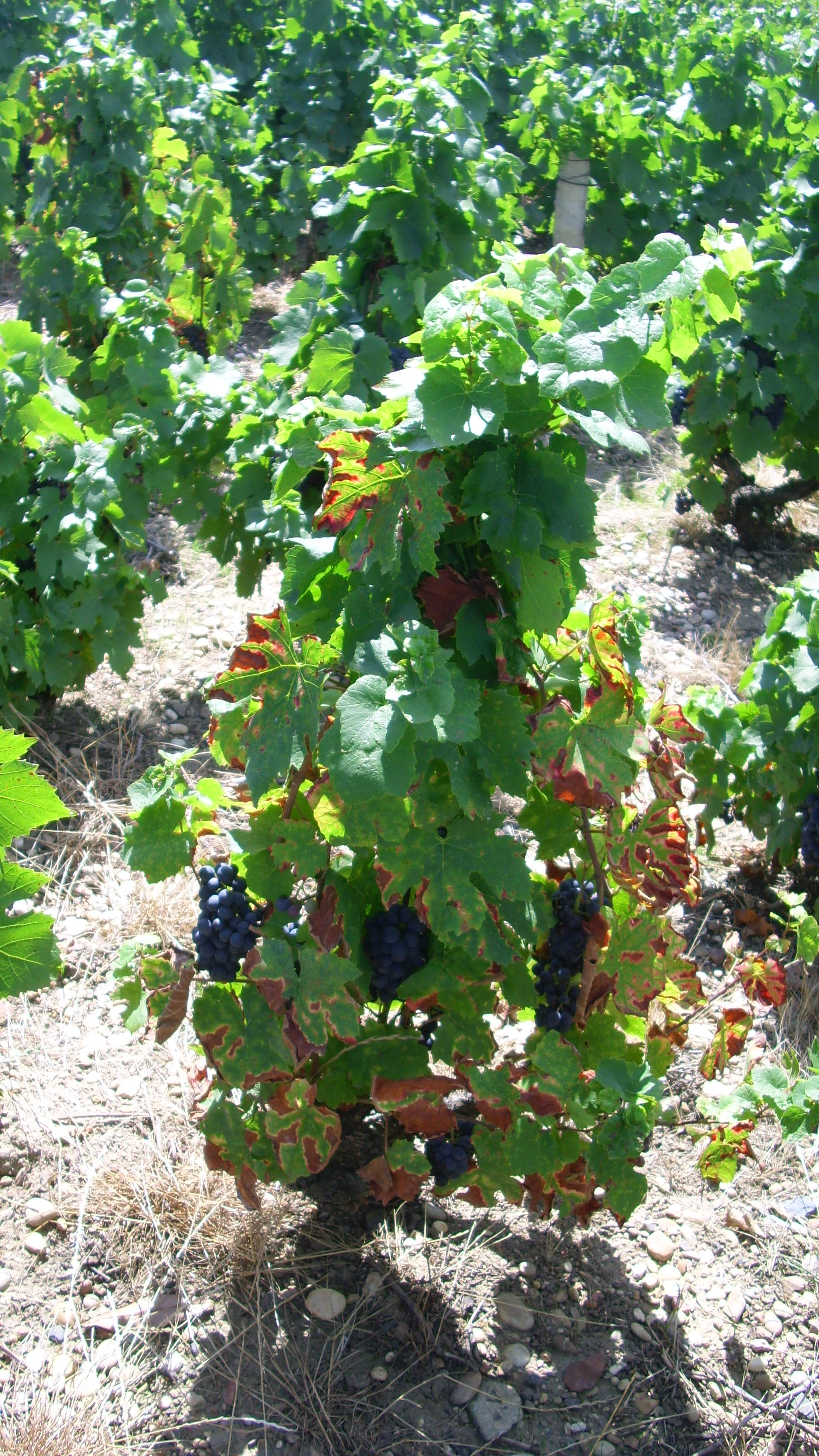 Pieds de vignes à Chénas (69) : appelation Chénas